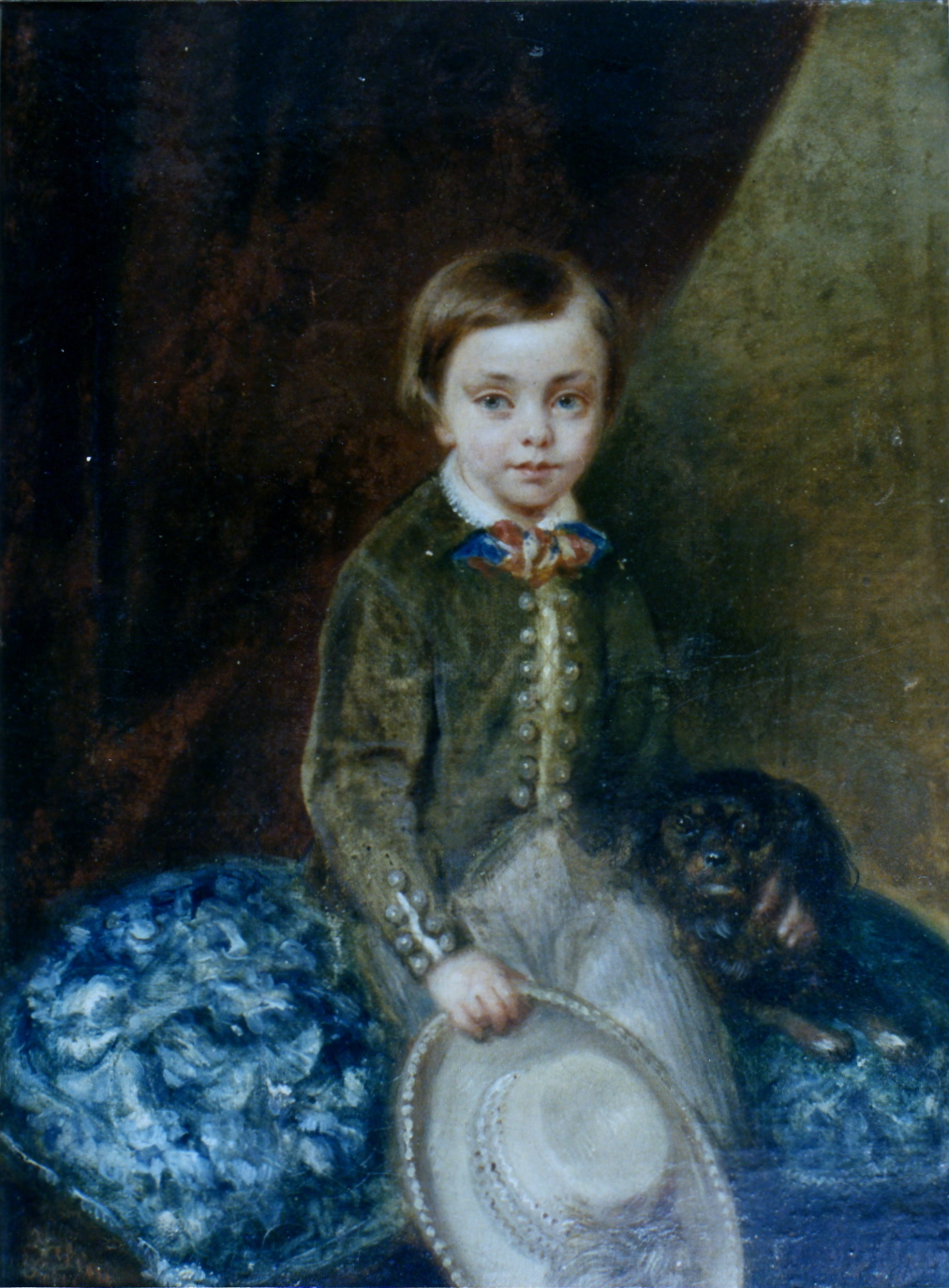 Tirso de Olazábal y Lardizábal, Count of Arbelaiz (1848)